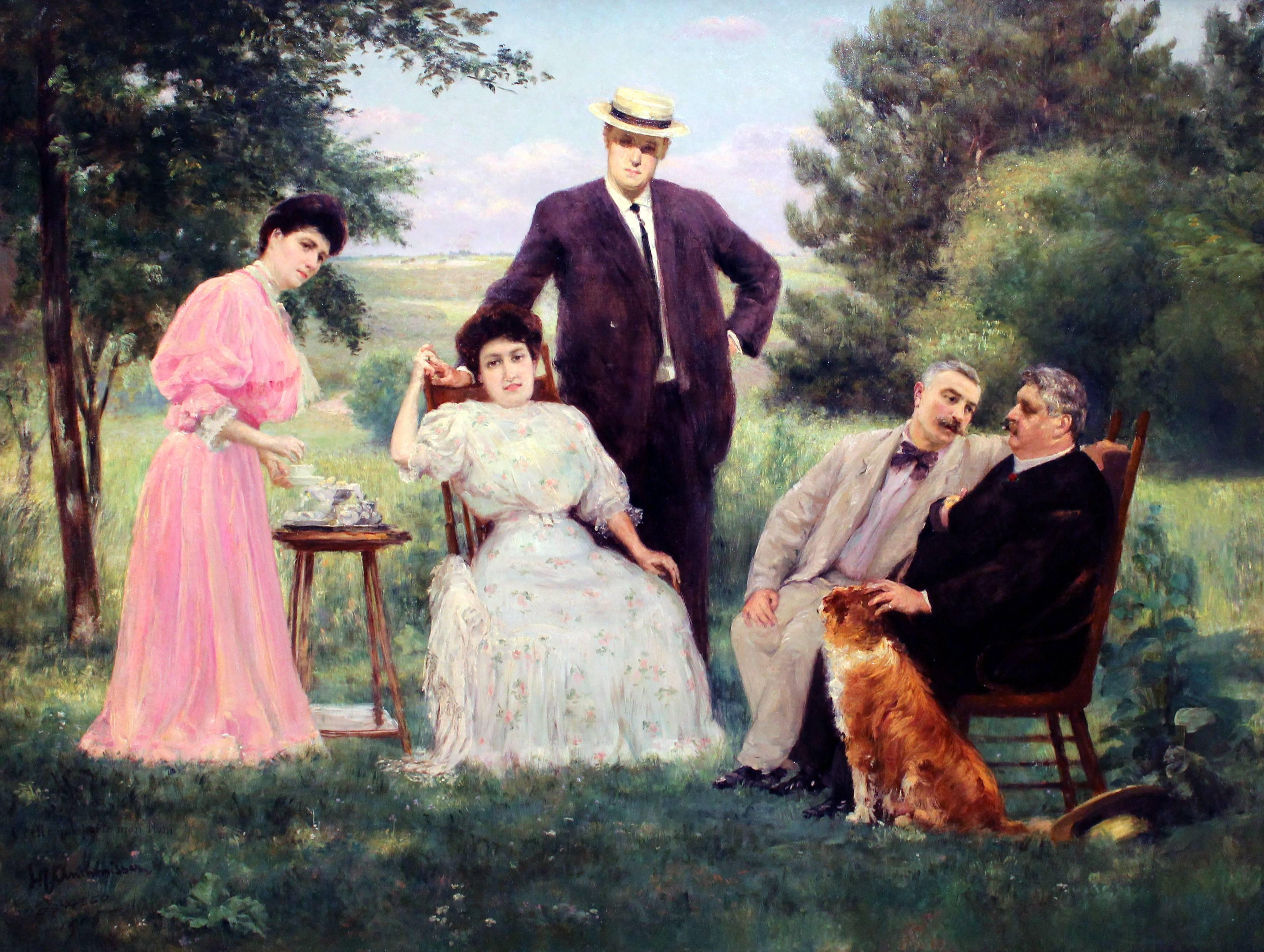 Le Docteur Eddy et ses Intimates